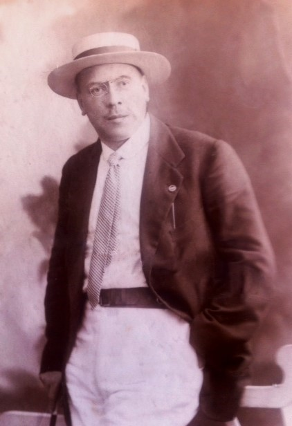 Николай Сергеевич Каринский, присяжный поверенный, Харьков, 1915